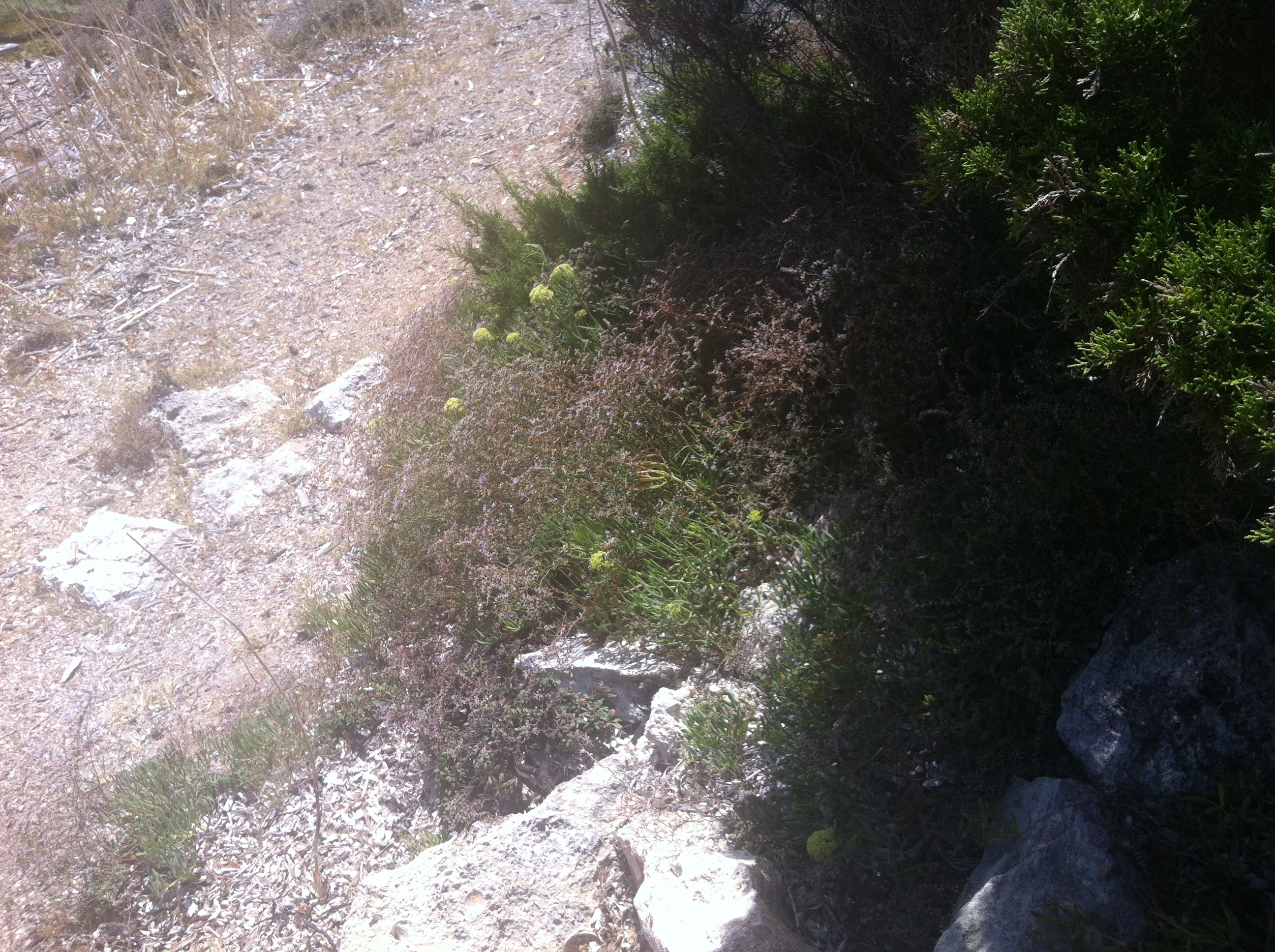 Specie endemica che cresce nell'isola di Pianosa